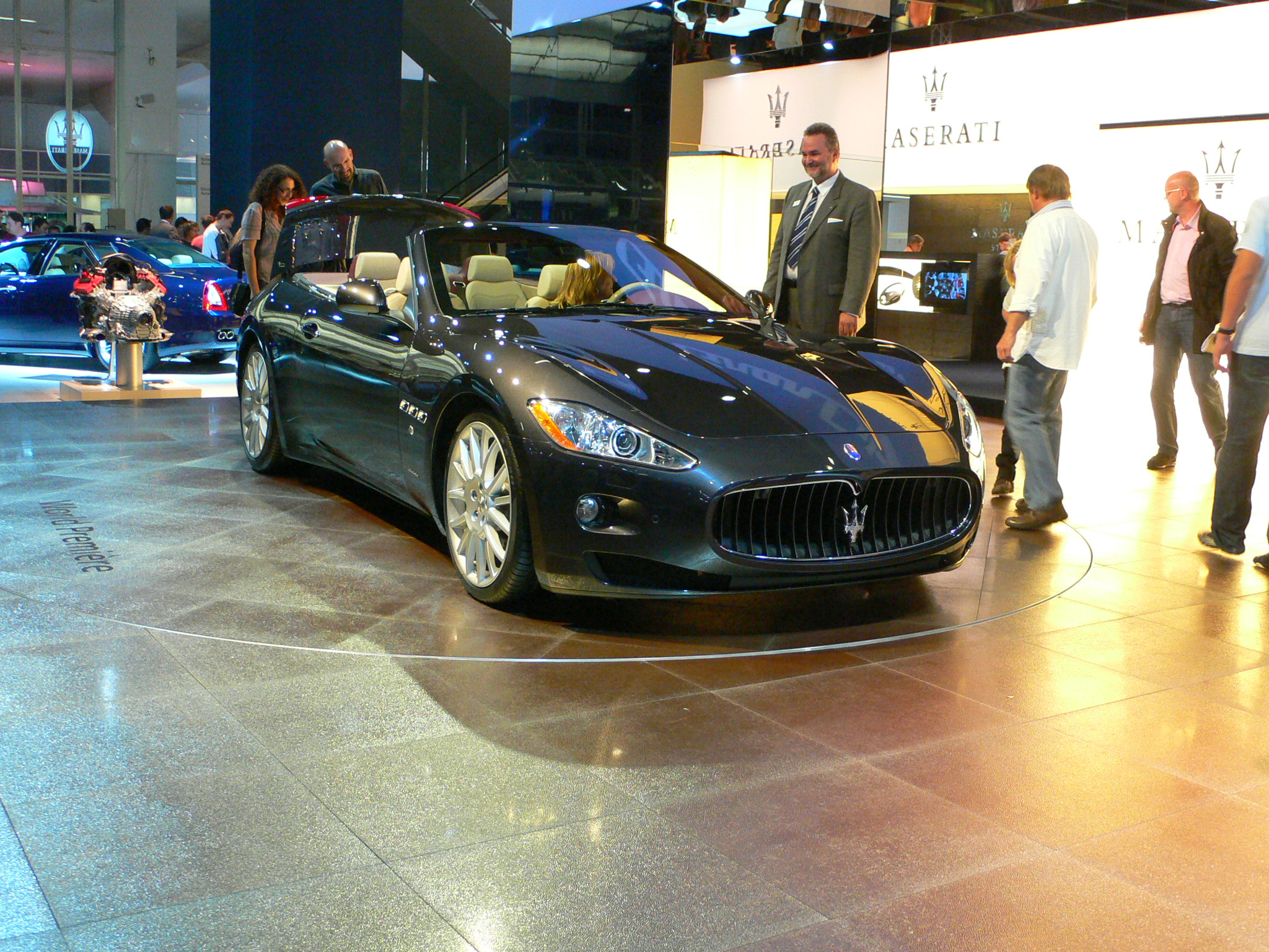 Maserati GranCabrio au Salon de Francfort 2009